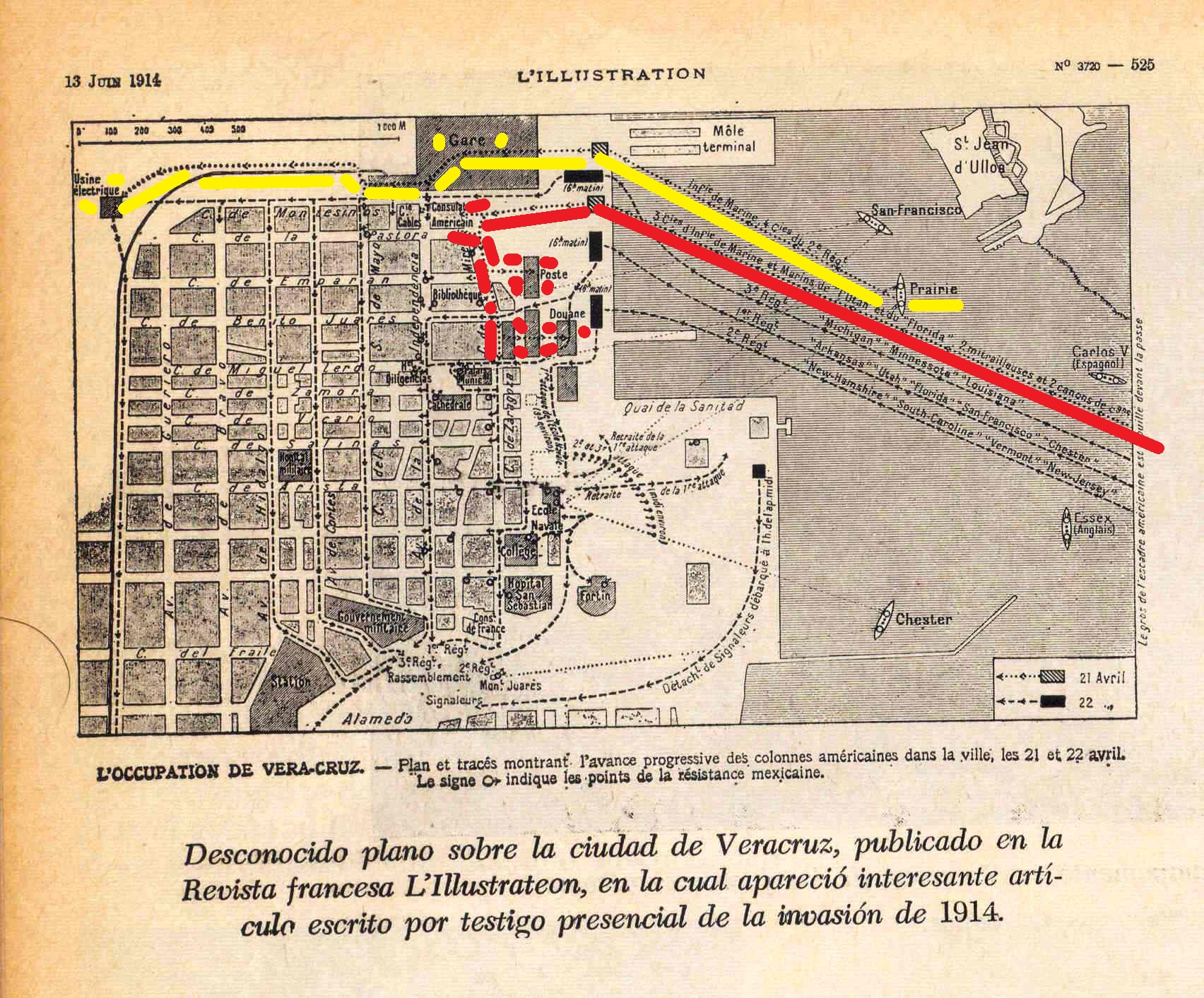 Plano de Veracruz con indicaciones de los desembarques y avances de tropas estadounidenses el 21 y 22 de abril de 1914, publicado originalmente por la revista francesa L'Illustration de junio 13 de 1914 y reproducido en la Revista Jarocha de Leonardo Pasquel en el número de abril 1966. Remarcado con colores por WKBC (1 diciembre 2017) para resaltar el avance de las tropas del USS Prairie (en amarillo) y las del USS Florida y USS Utah (en rojo).